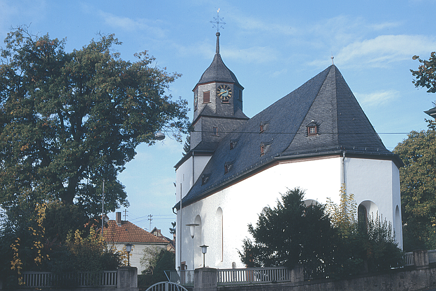 Die evangelische Kirche in Brandoberndorf, Hessen, Ansicht von der Apsisseite